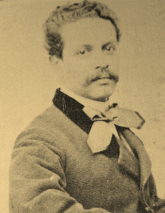 El compositor chileno Federico Guzmán